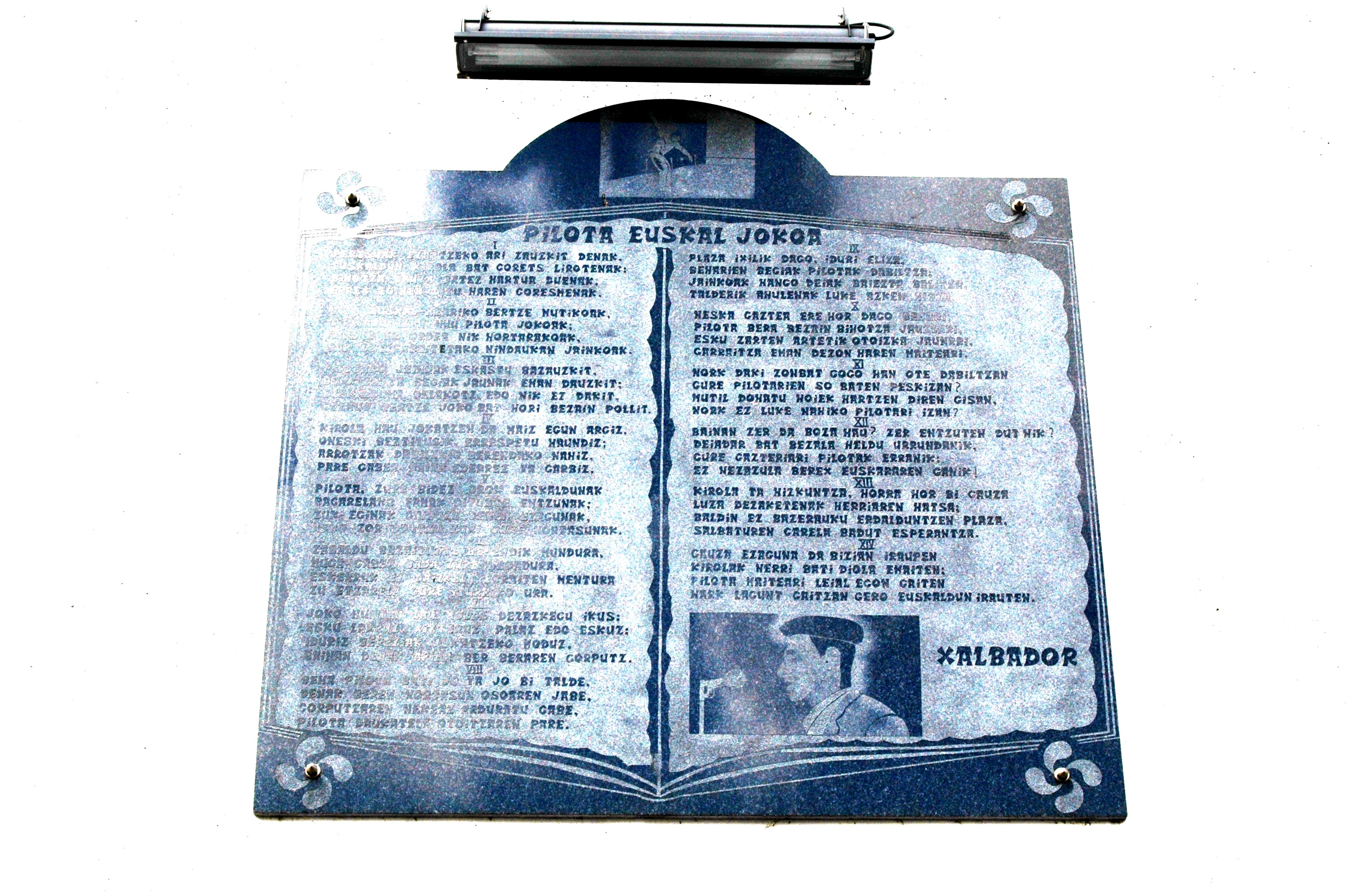 Urepel, hommage au bertsulari Xalbador. Plaque apposée sur le mur du trinquet.